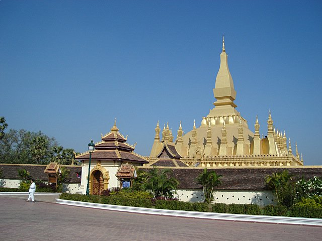 Pha That Luang,Laos